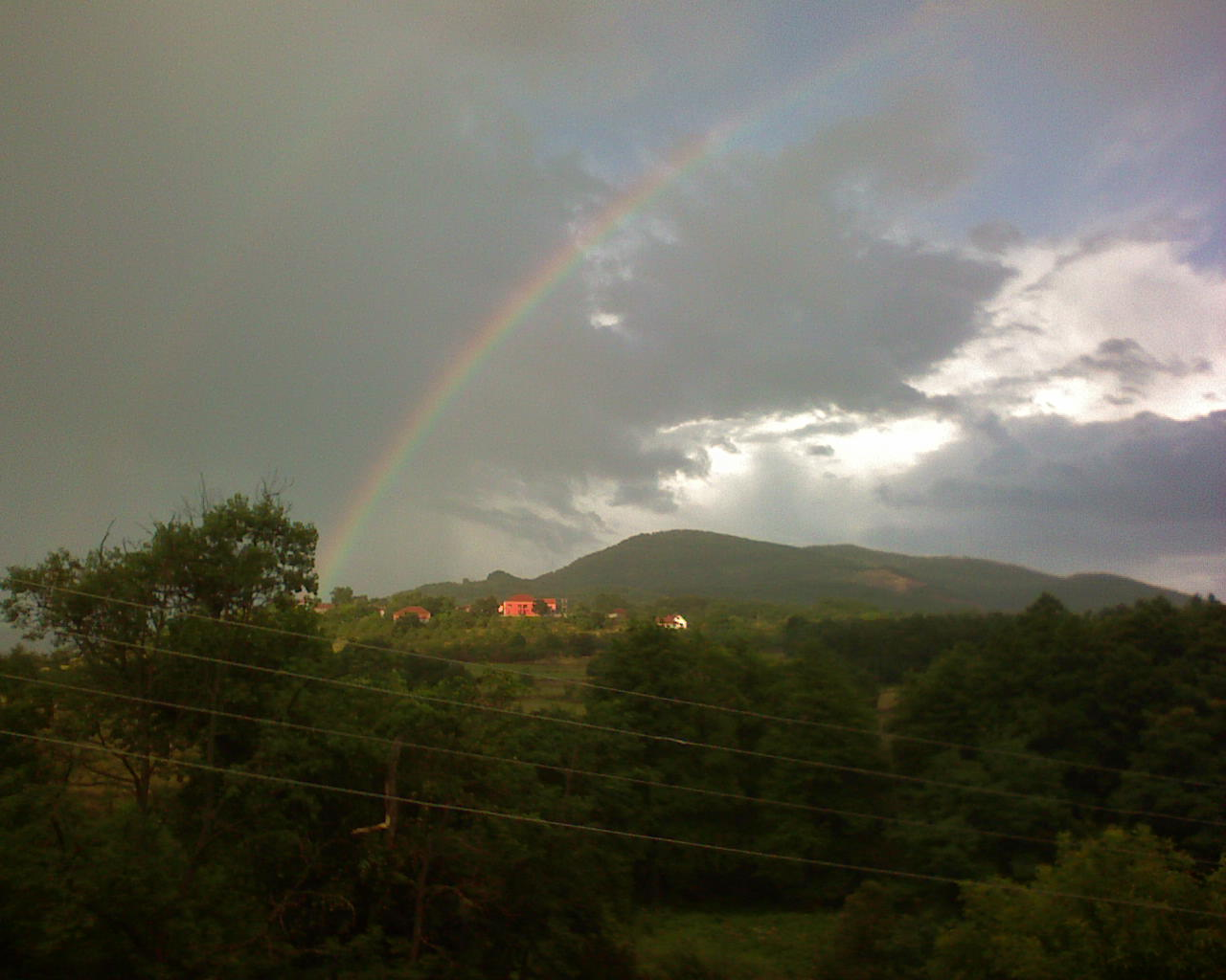 Snimak iz reke prema Jariku Description Поглед на брдо по коме је Јариње добило име, снимак из реке према Јарику Date13:02, 22. новембар 2013. (CET)SourceЈа (Budokv (разговор)) сам аутор овог дела.‘’AuthorBudokv (разговор) Licensing Поглед на брдо по коме је Јариње добило име, снимак из реке према Јарику